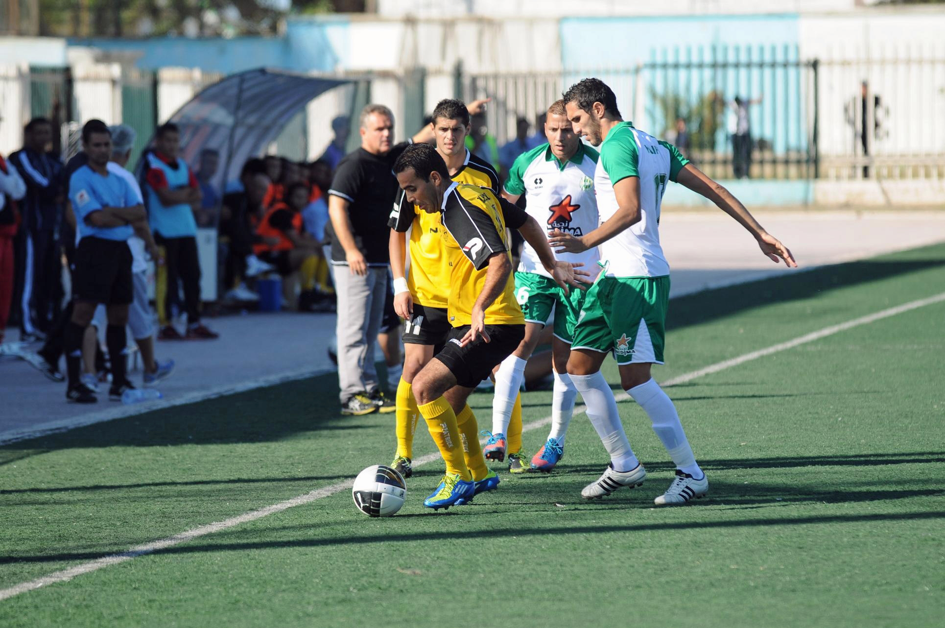 USM El Harrach defeated JS Kabylie 1-0 in their season opener. اتحاد الحراش يهزم شبيبة القبائل 1-0 فى أول مباريات الدوري. L'USM El Harrach s'est imposée 1 à 0 face à la JS Kabylie lors de son match d'ouverture du championnat.